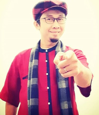 Pendongeng dari Gunung Putri Bogor